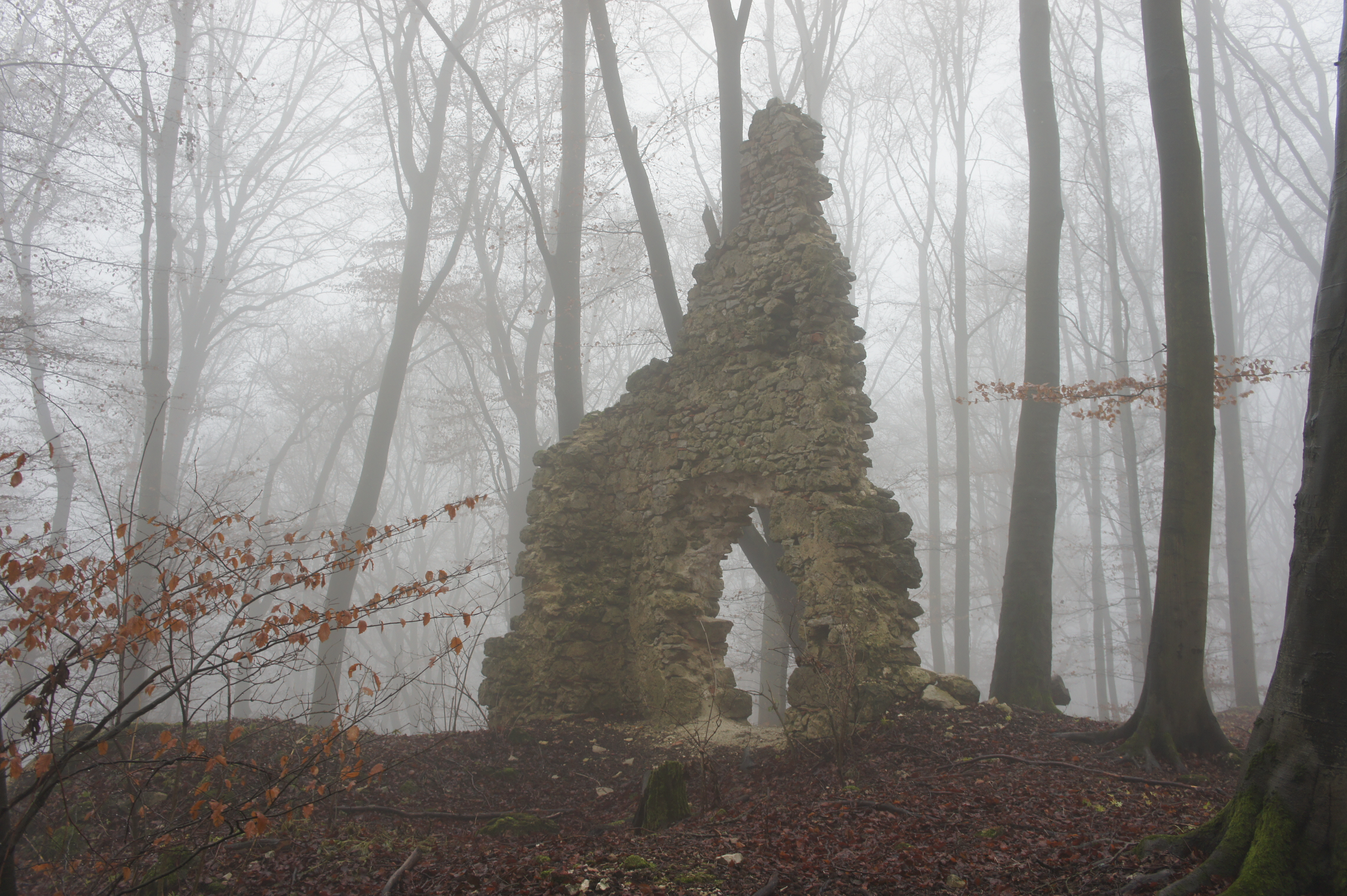 VorburgThis is a photograph of an architectural monument.